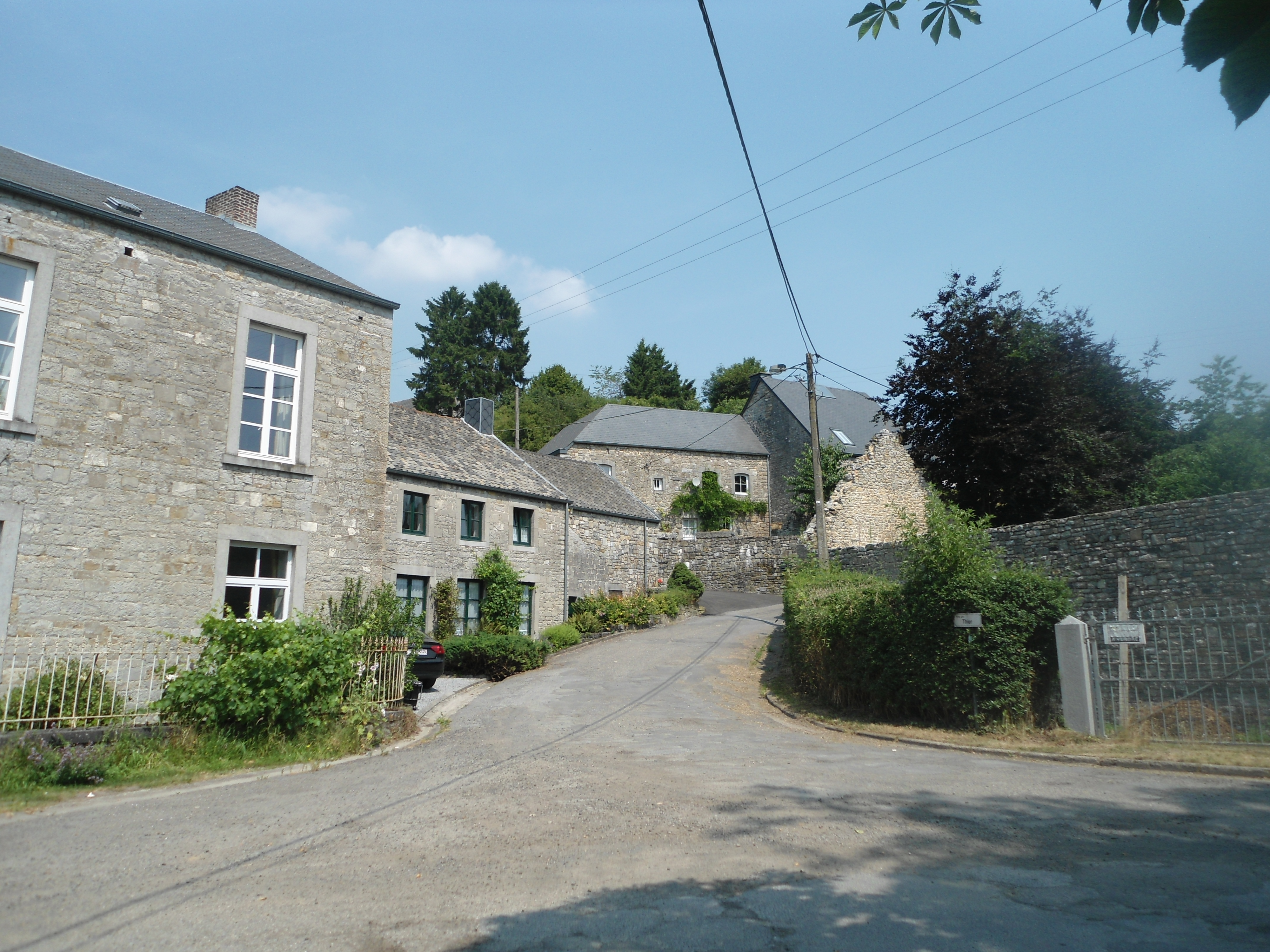 Maisons en pierre calcaire dans le village de Pailhe (Clavier)